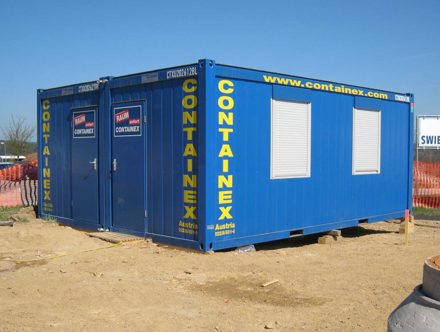 Bürocontainer als Baustellencontainer am Standort Zwettl Österreich, Fotograf: Markus Schaden; Lieferant * Containex